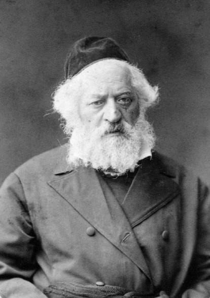 Portrait of Rabbi Yitzchak Elchanan Spektor